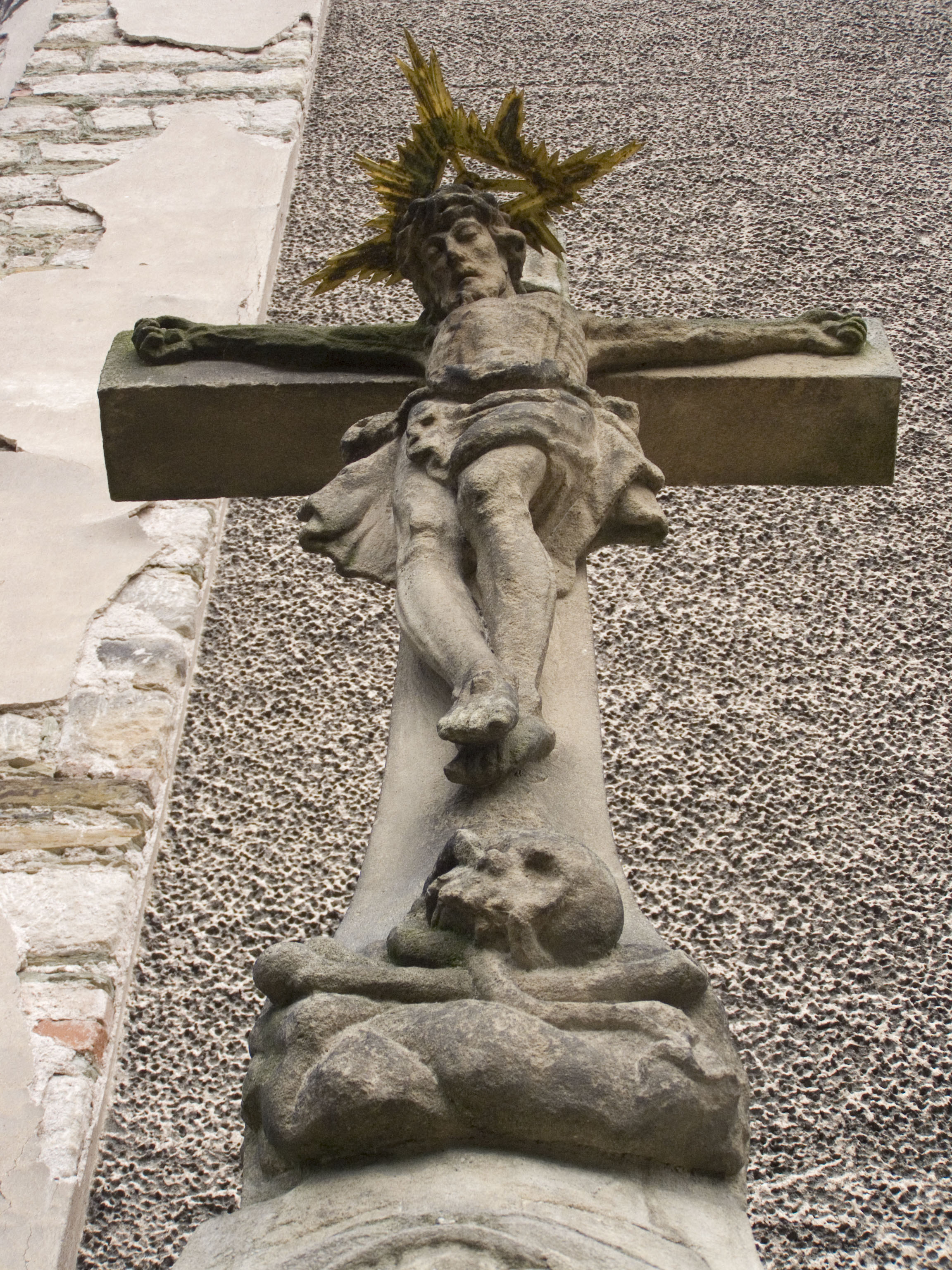 Otovice, Kostel svaté Barbory